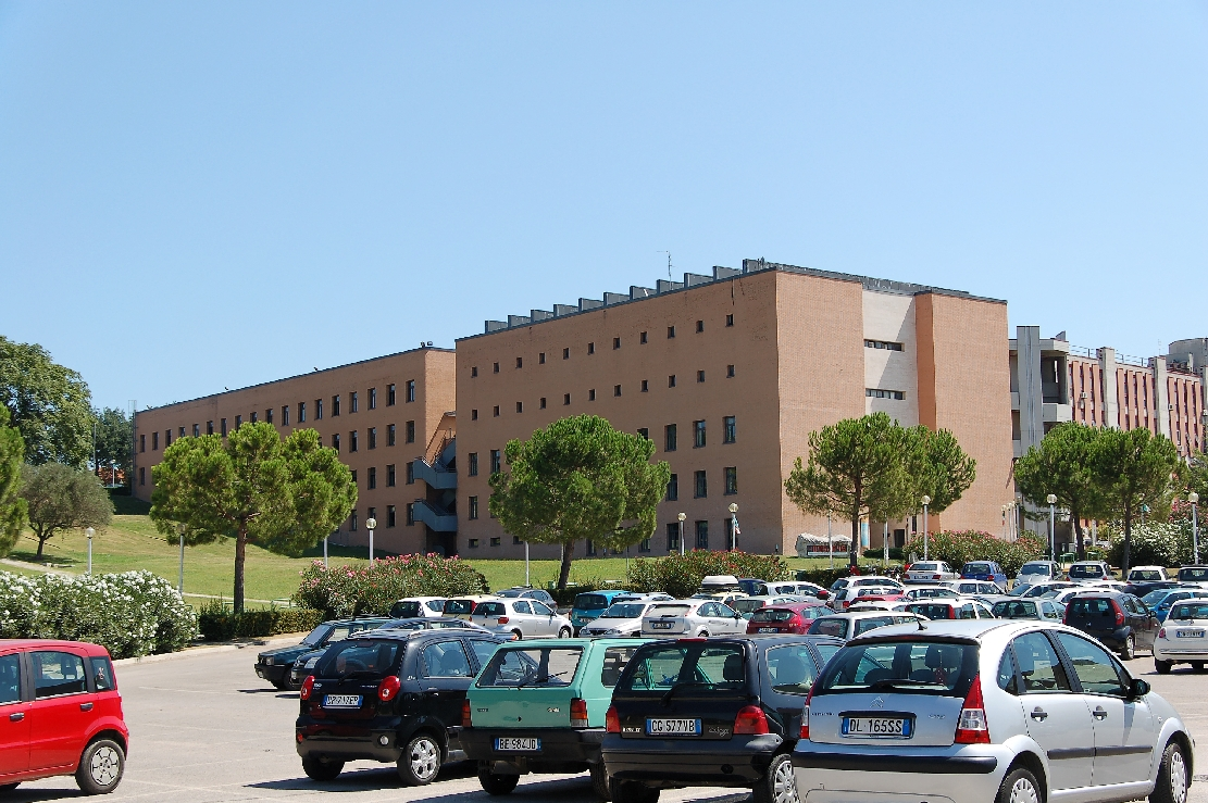 Chieti 2011